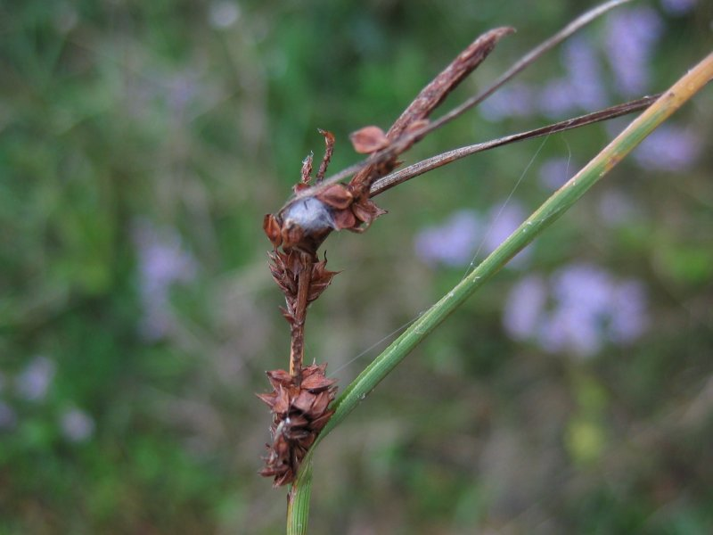 Strand-Segge (Carex extensa), Wismarbucht